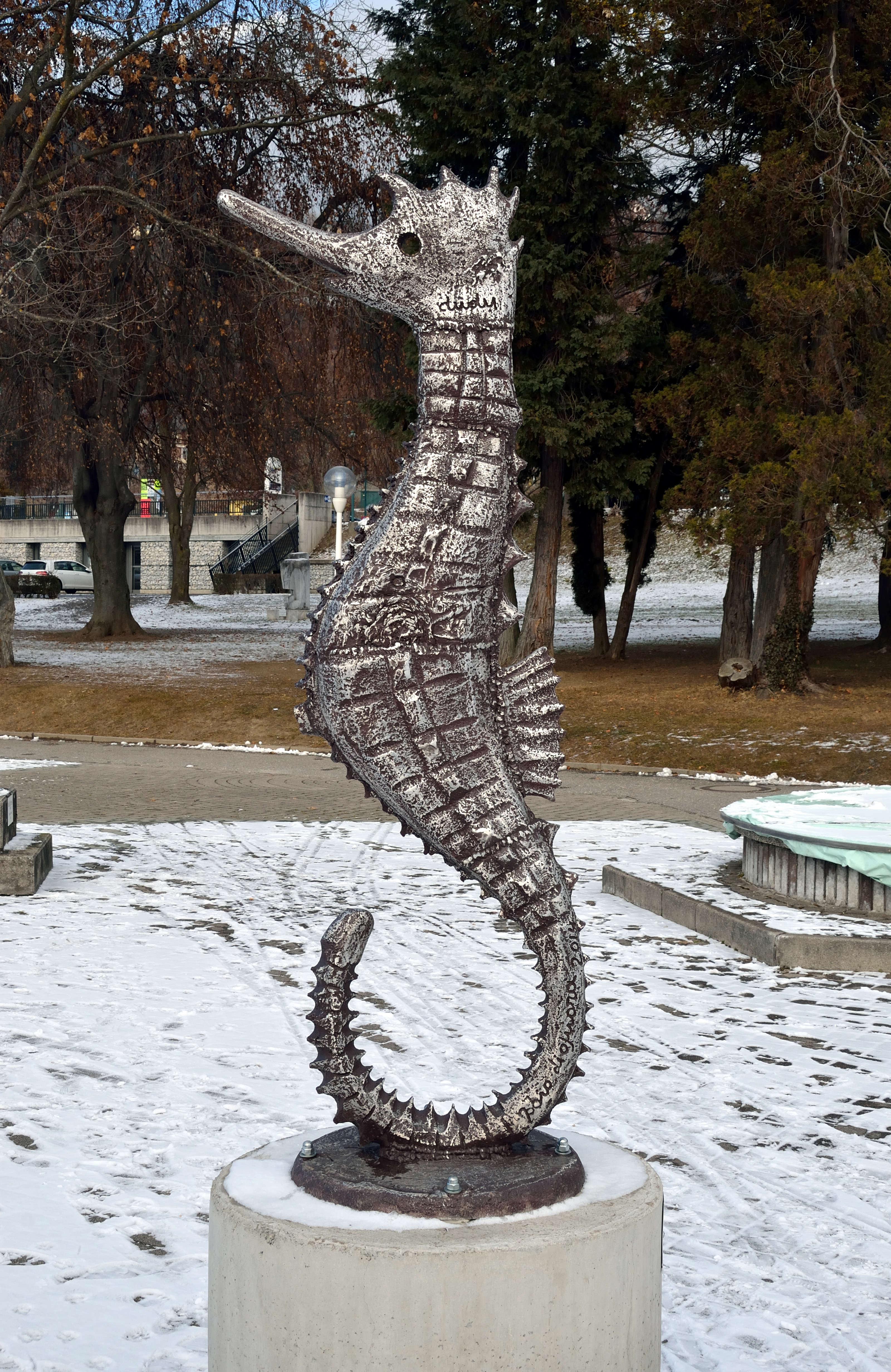 Seepferdchen von Fábio di Ojuara, Brasilien, 2014 in Millstatt, Kärnten. In Erinnerung an seinem im Jahr 2013 verstorbenen Sohn Eduardo "Dudu". Die Skulptur steht oberhalb des Strandbads.